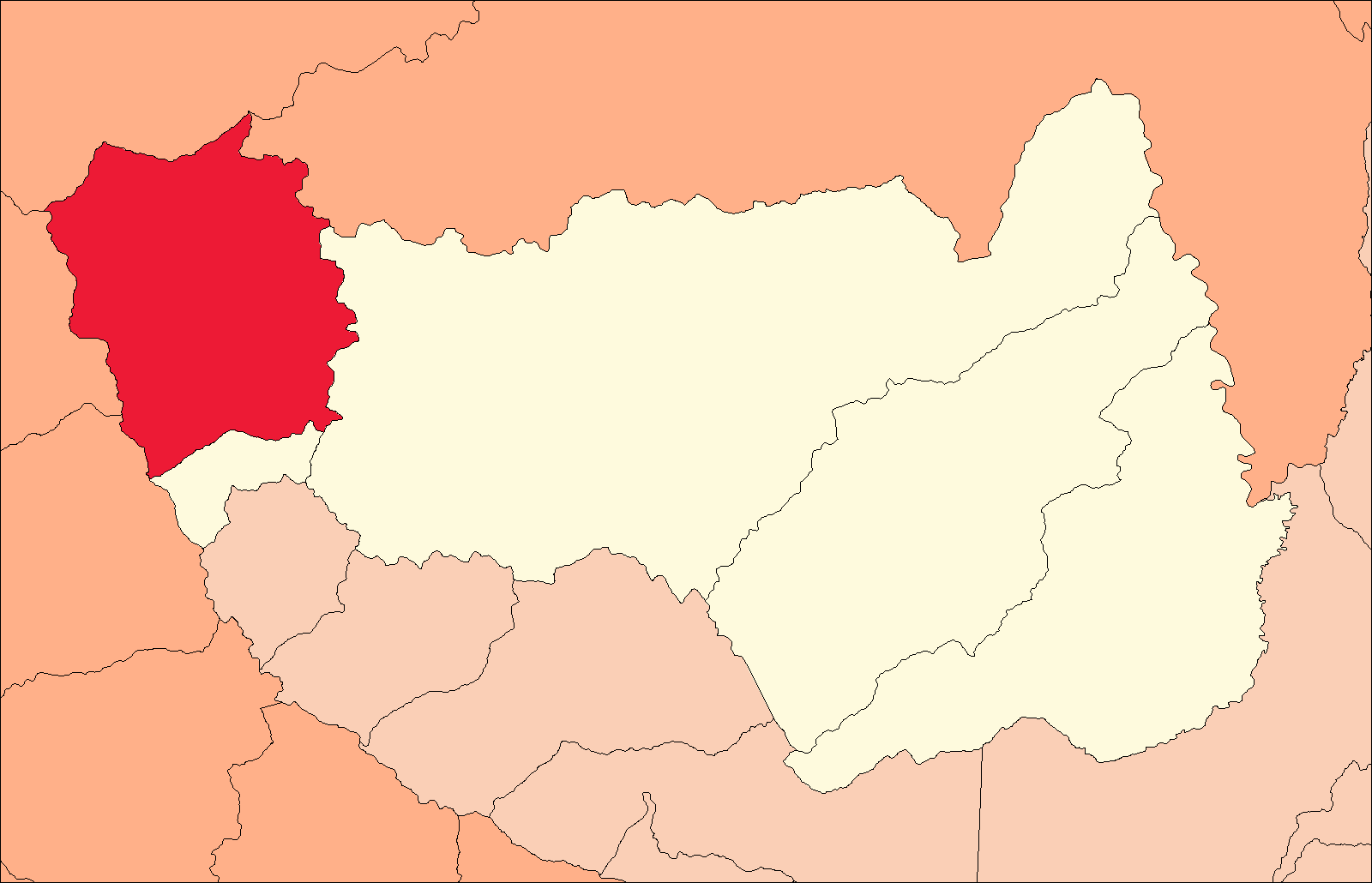 Área del distrito de Huacrachuco en la provincia de Marañón.